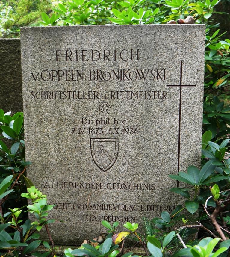 Grab des Schriftstellers, Übersetzers, Herausgebers und Kulturhistorikers Friedrich von Oppeln-Bronikowski (1873-1936) auf dem Südwestkirchhof in Stahnsdorf